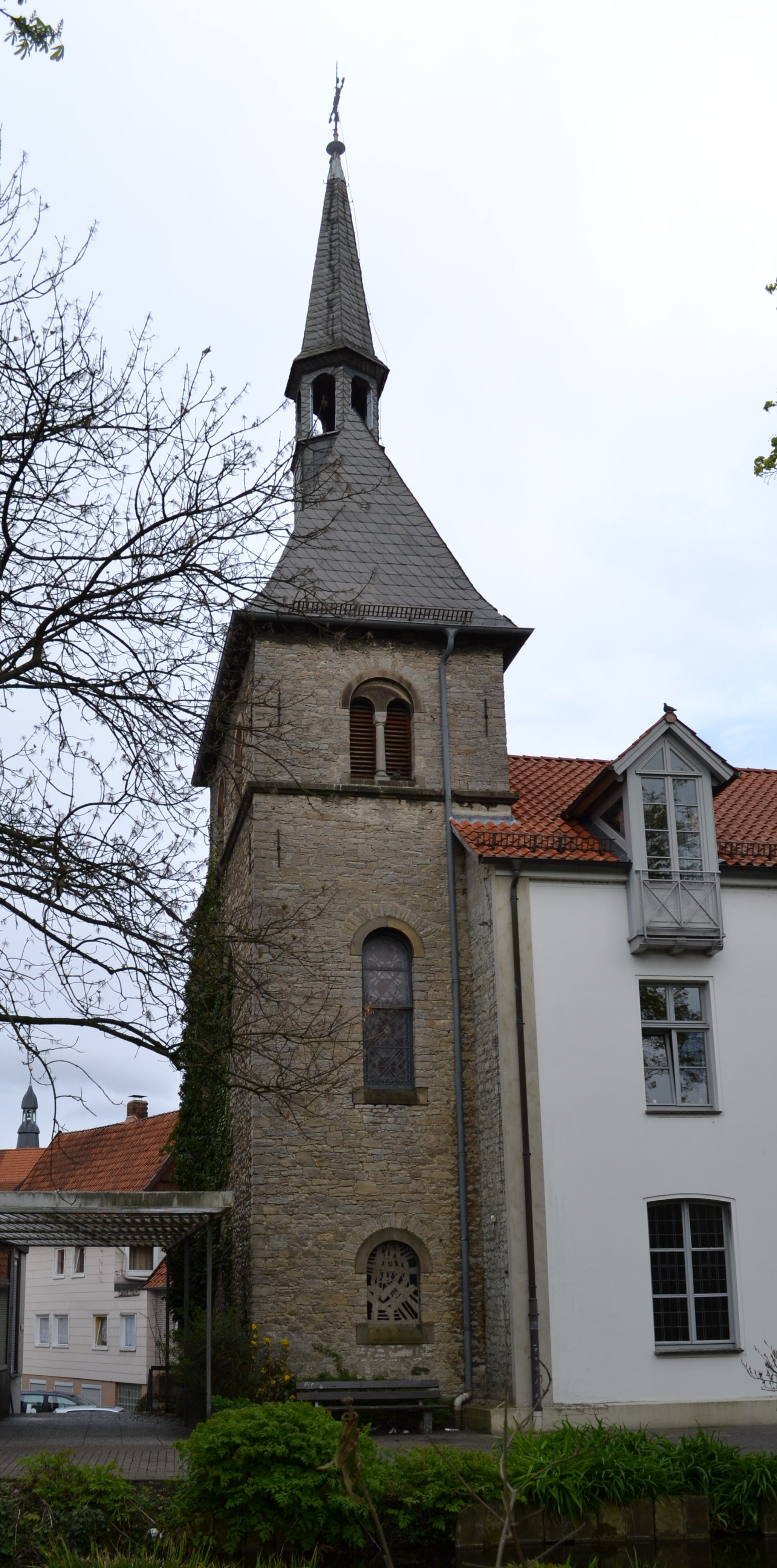 Baudenkmal Detmold Nr. 316 - Kirchturm Wallgraben 8 Teil der ehemaligen katholischen Kirche